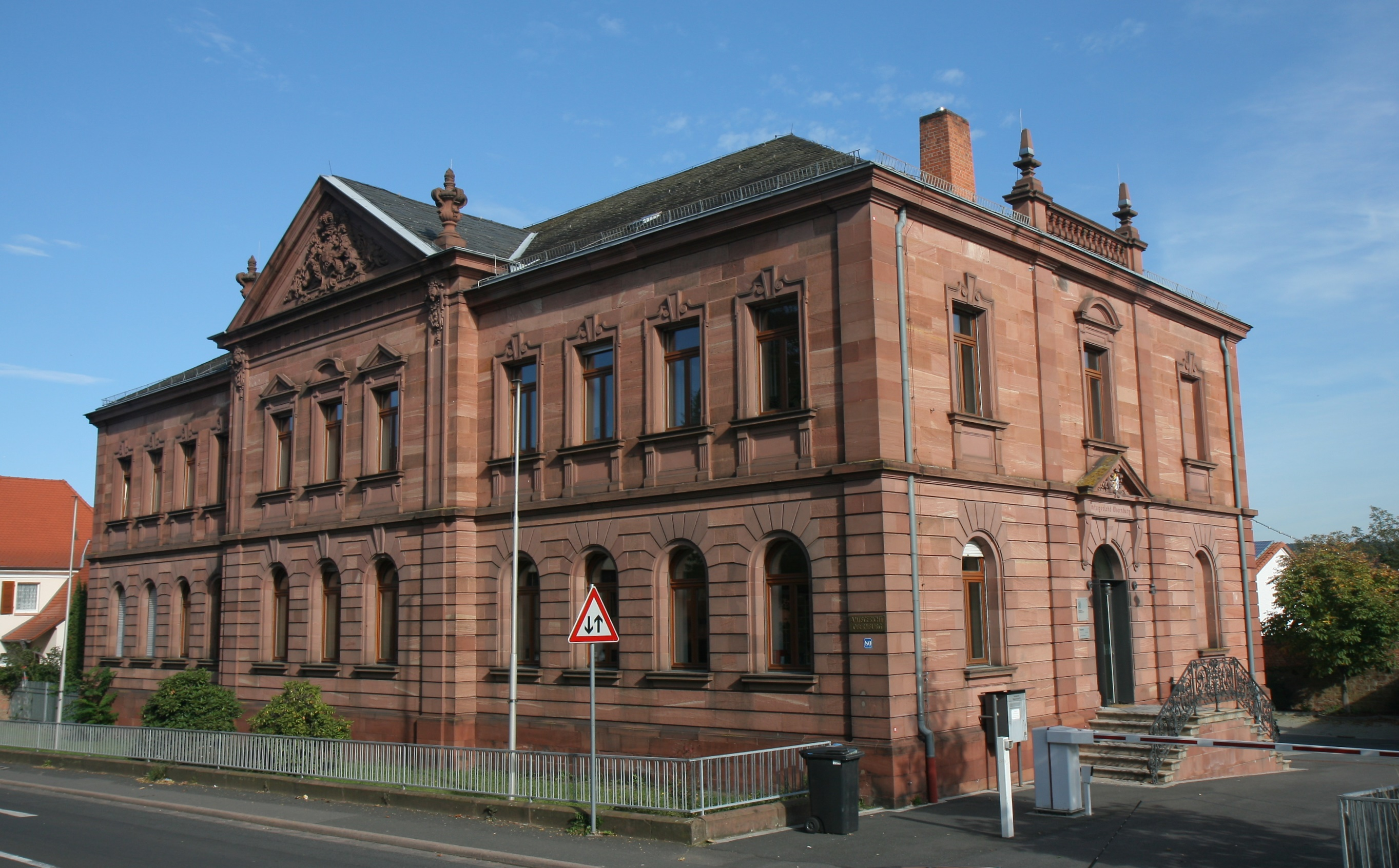 Amtsgericht Obernburg, Römerstraße 80 in Obernburg am Main. This is a photograph of an architectural monument.